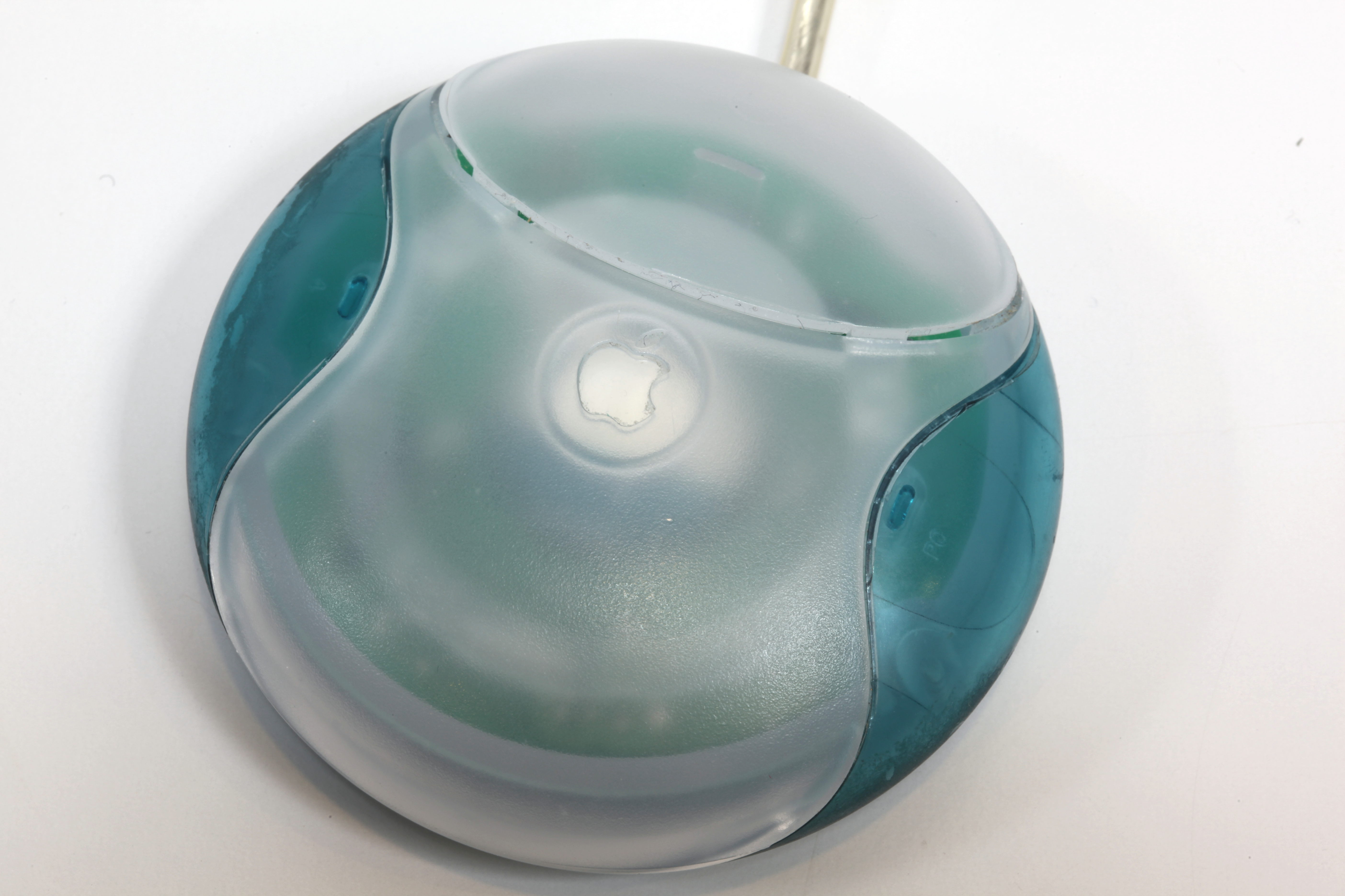 User:Rama/Bolo/iMac G3